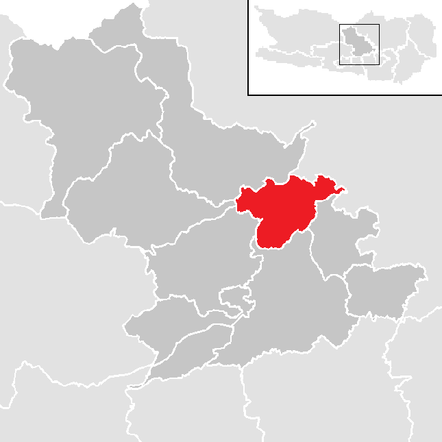 Bezirk Feldkirchen